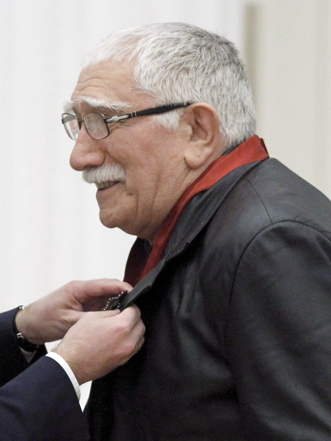 Армен Джигарханян